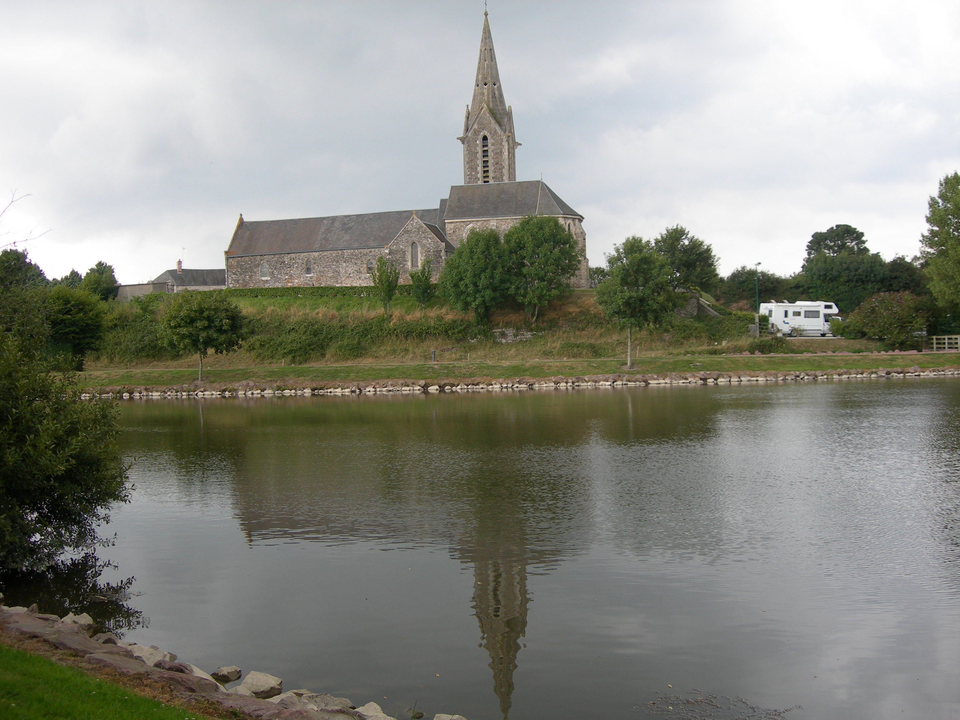 Eglise de La Feuillie et son reflet dans le plan d'eau.